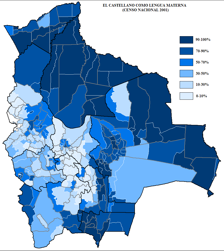 На карте отображено распределение лиц с родным языком кастильским по муниципалитетам Боливии.